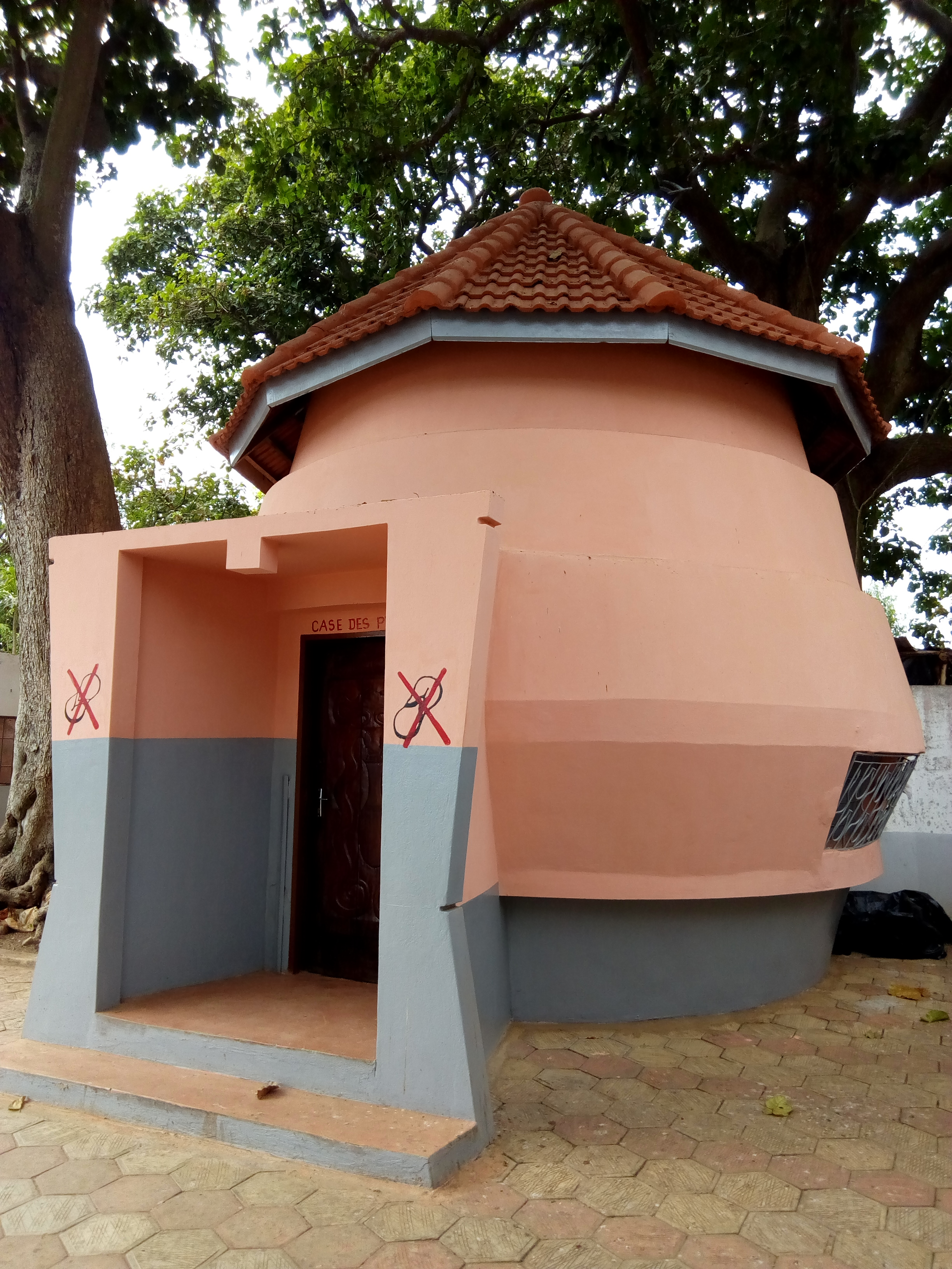 le temple des pythons Ouidah